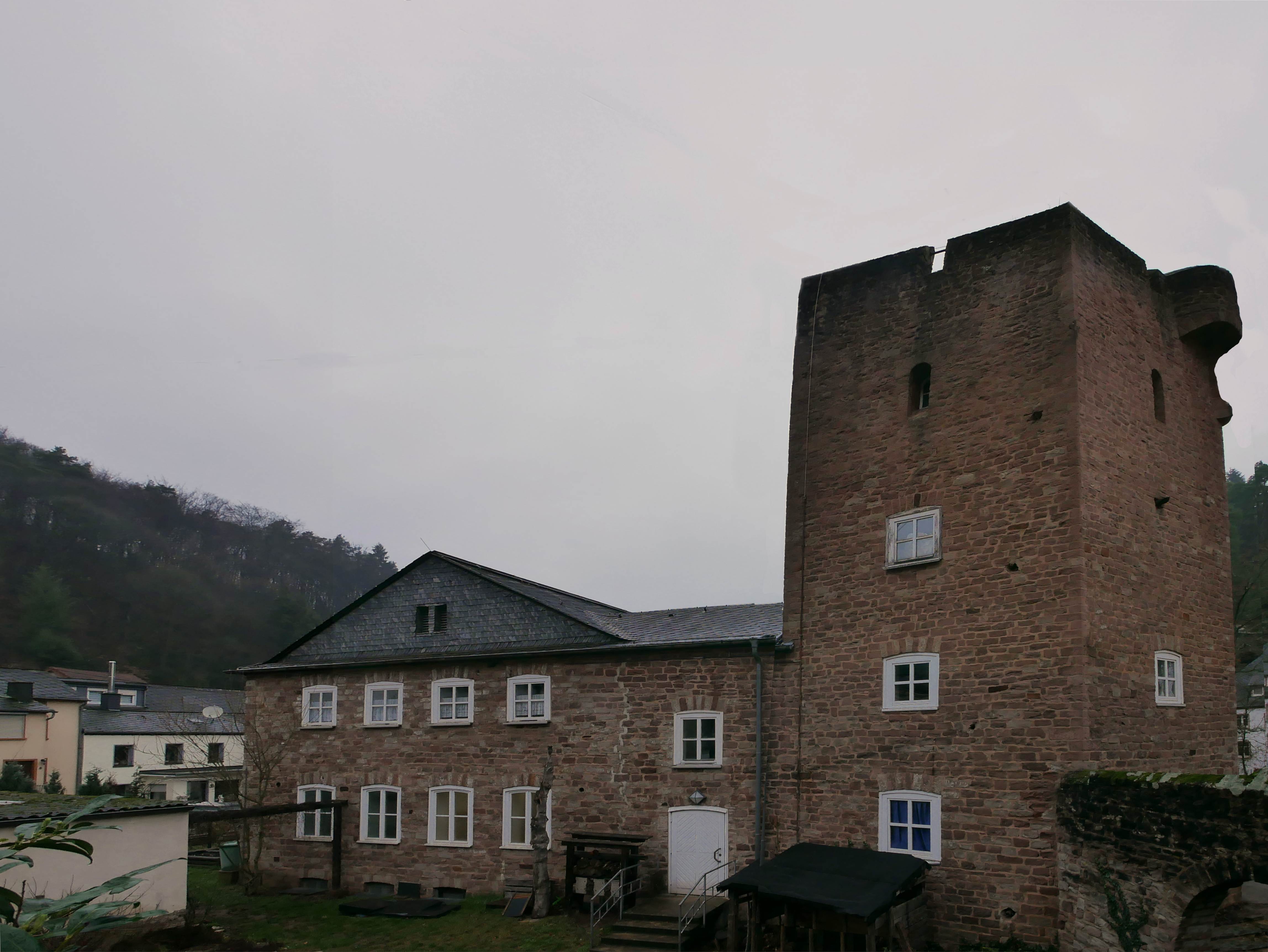 1936 / 37 als "Staatsjugendheim" auch Haus der NSDAP und Großheim der HJ genannt, nach Plänen des Leiters des städtischen Hochbauamtes Heinrich Otto Vogel und E. Winklers errichtete Gebäude. Linker Anbau später angefügt.